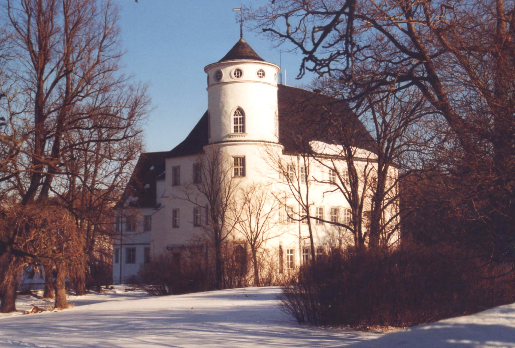 Bärenstein (Altenberg): Blick auf das Schloss